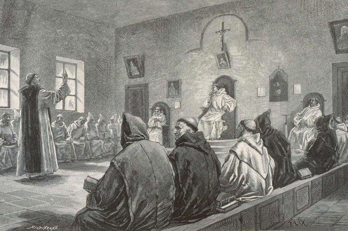 Réunion du chapitre chez les Trappistes d'Oelenberg. Bibliothèque nationale et universitaire de Strasbourg